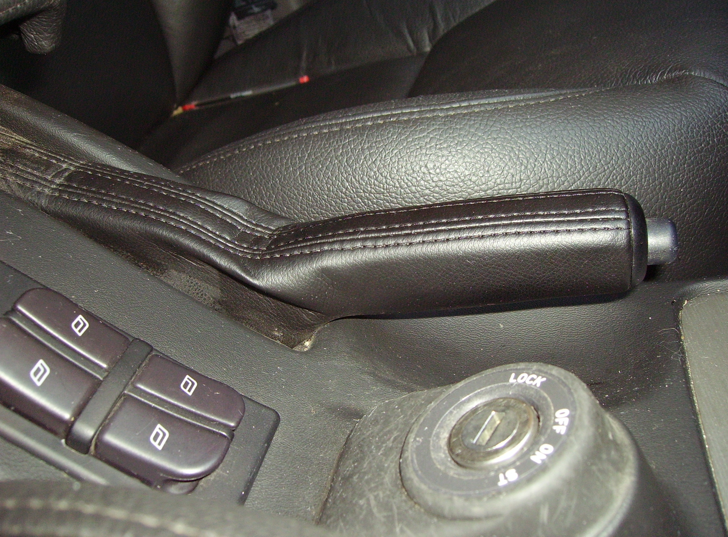 Handbrake lever (Saab 9-5)